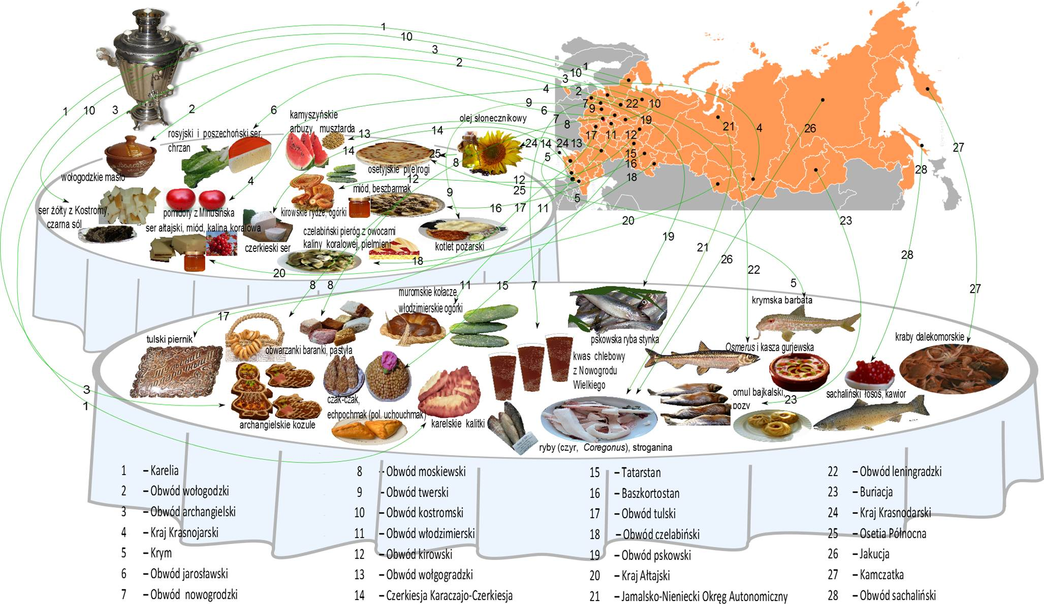 Mapa kulinarna Federacji Rosyjskiej (2)